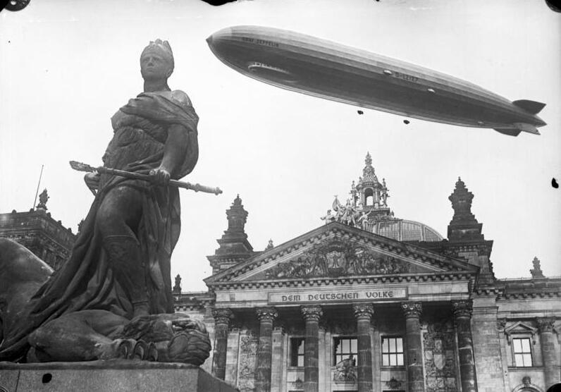 "Graf Zeppelin" über Berlin! "Dem deutschen Volke". Das Zeppelin-Luftschiff "Graf Zeppelin" überfliegt das Reichstagsgebäude in Berlin.